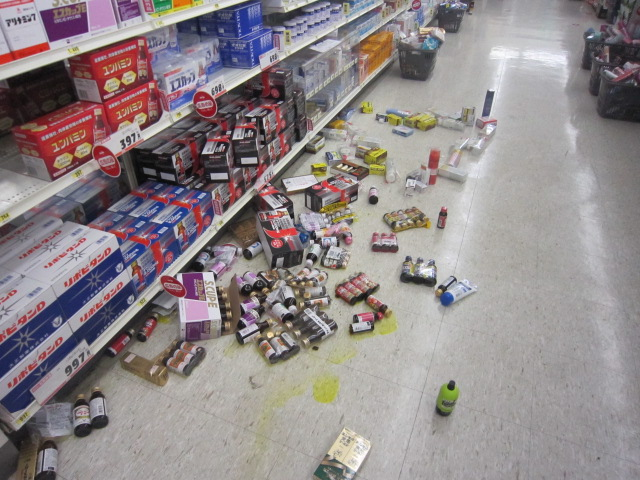 食籾店エービンの被害の様子です。瓶が棚から落ちて壊れています。（千葉県習志野市東習志野4丁目308-1）